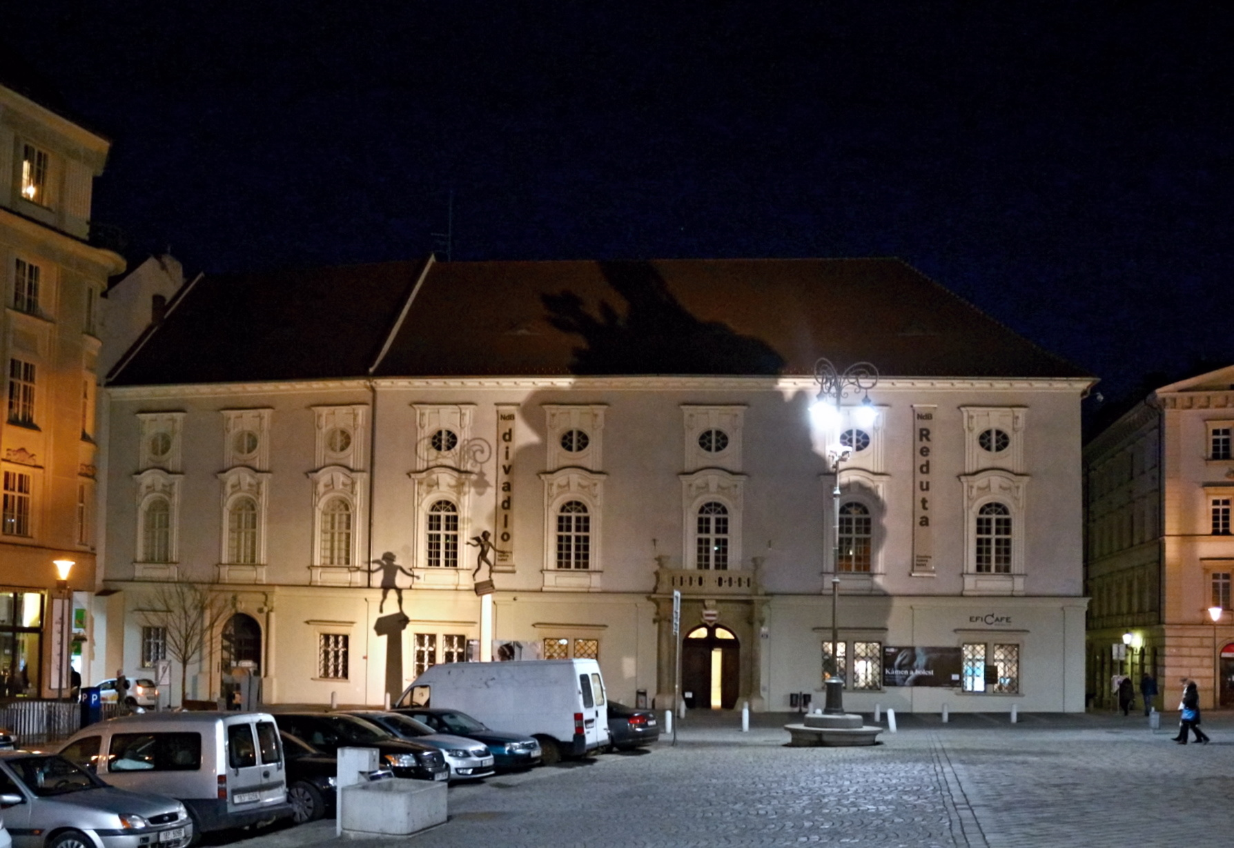 Divadlo Reduta